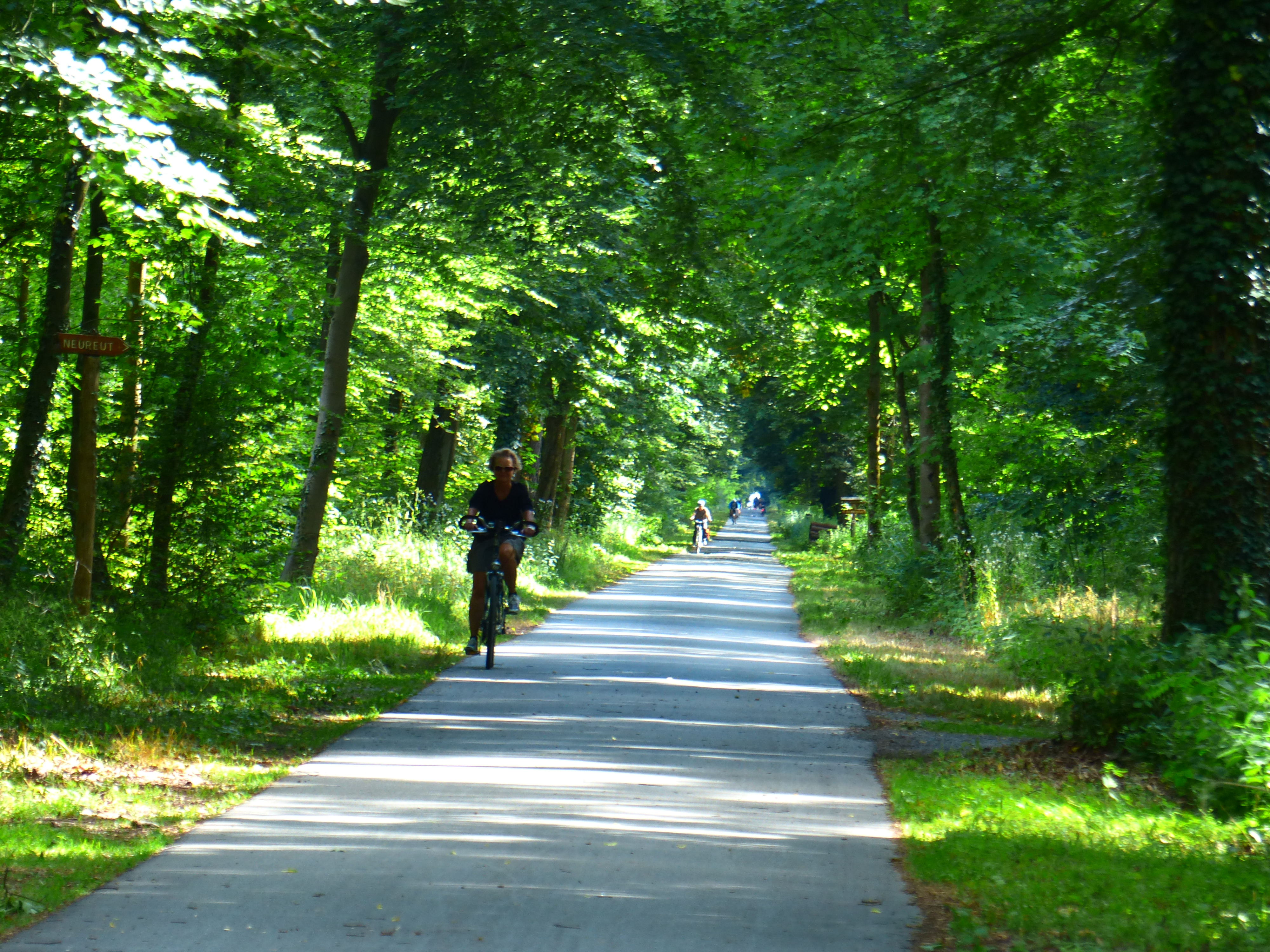 Vielbenutzte Fahrradverbindung Friedrichstaler Allee im Karlsruher Hardtwald, Blick südwärts in Richtung L 604